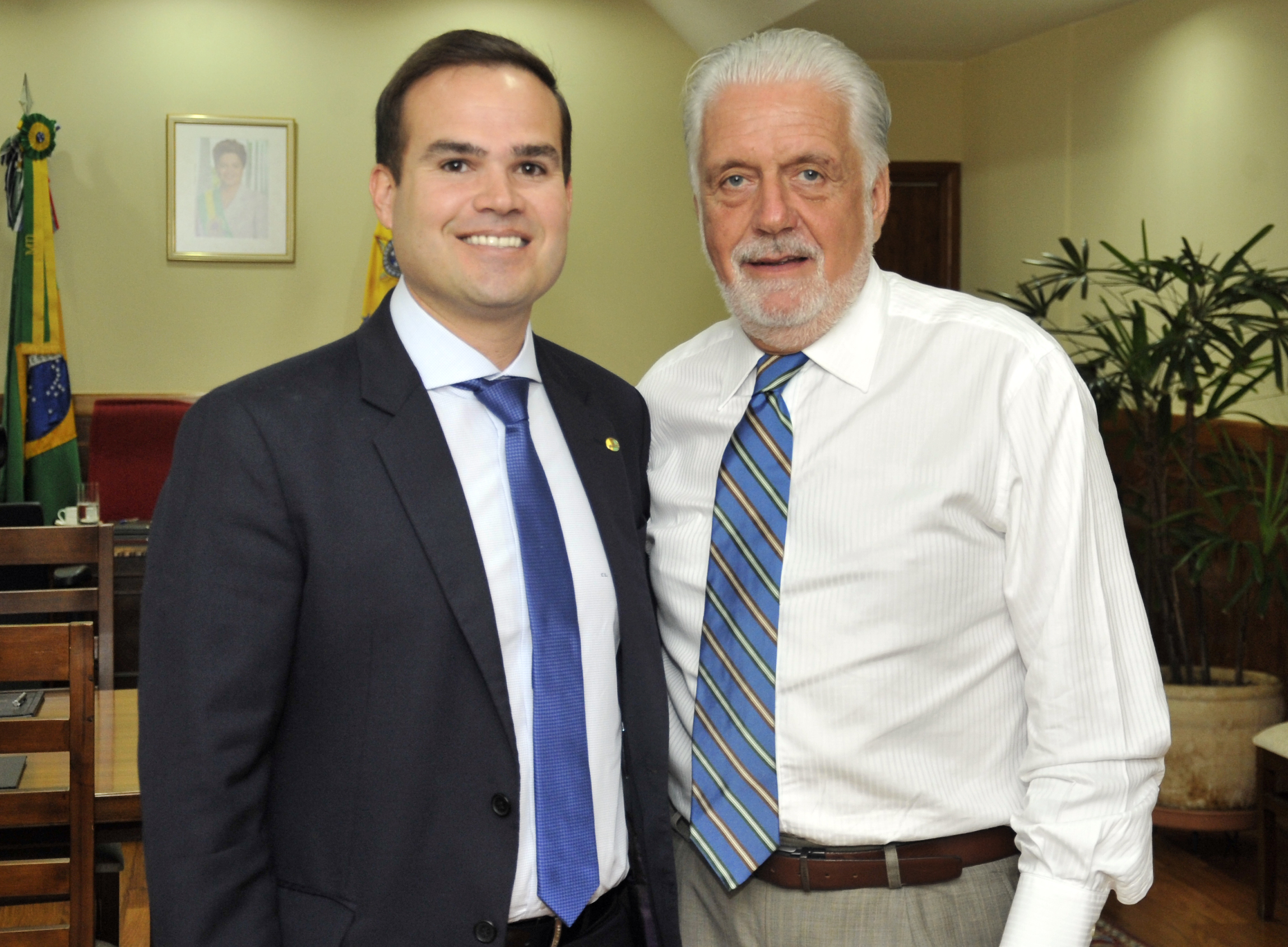 05/03/2015, Brasília - DF Fotos: PH Freitas